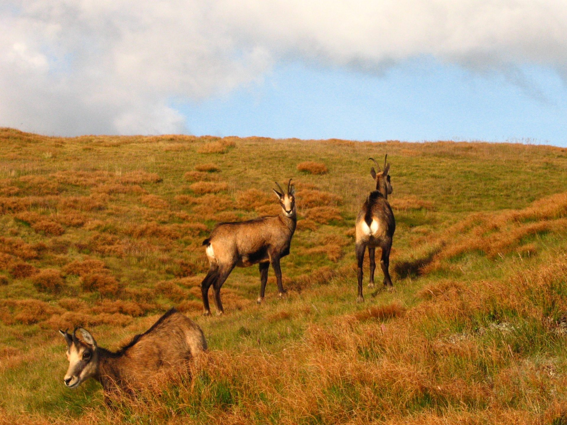 Kozice na zboczu Starorobociańskiego Wierchu.